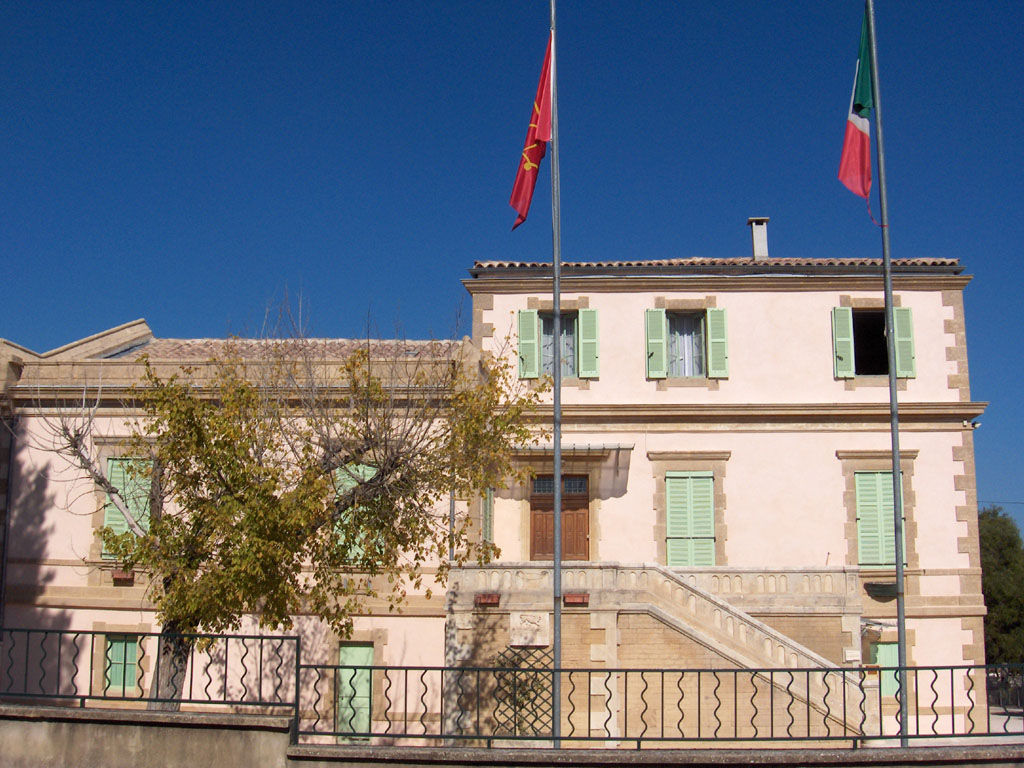 Mairie de La Calmette (Gard) Photo prise le 09/10/05